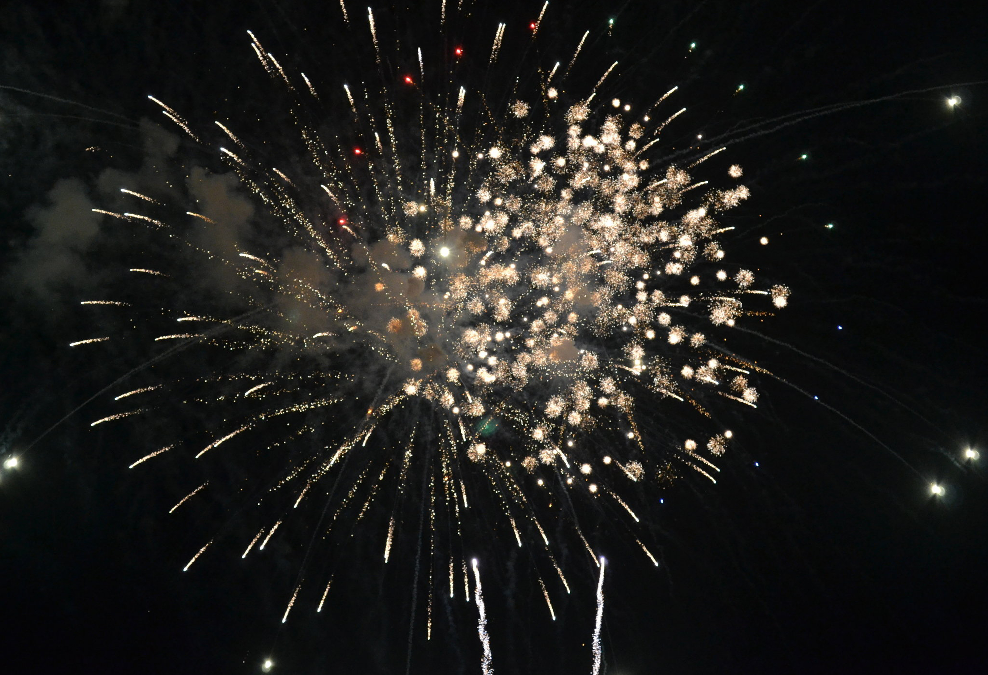 Fuegos artificiales en la Bahía de Boquerón.